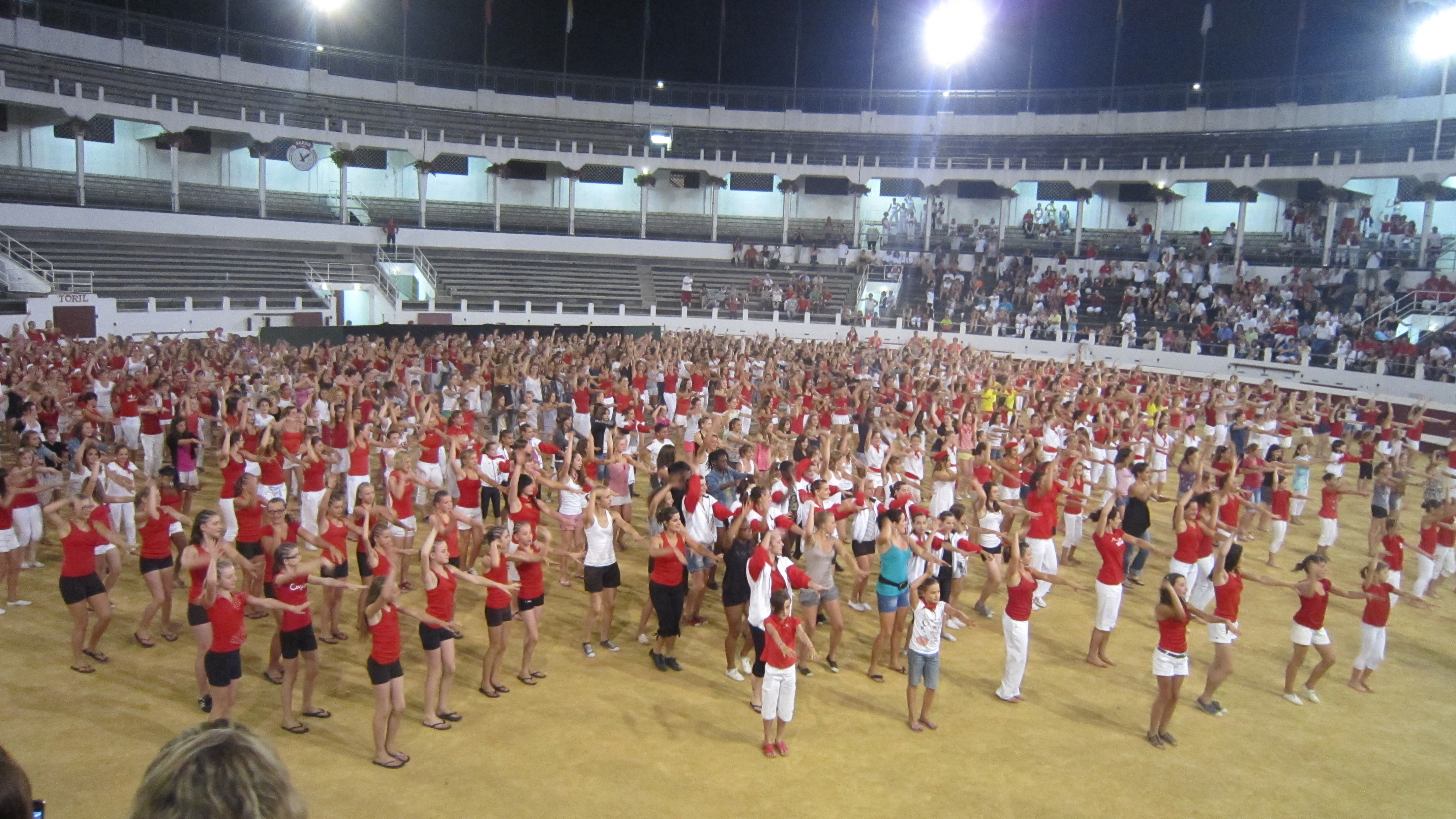 Festivités du championnat fédéral de gymnastique féminine 2011 organisé par la Fédération sportive et culturelle de France à Dax, dans le département français des Landes.